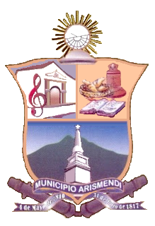 Escudo municipio Arismendi, isla de Margarita, estado Nueva Esparta, Venezuela